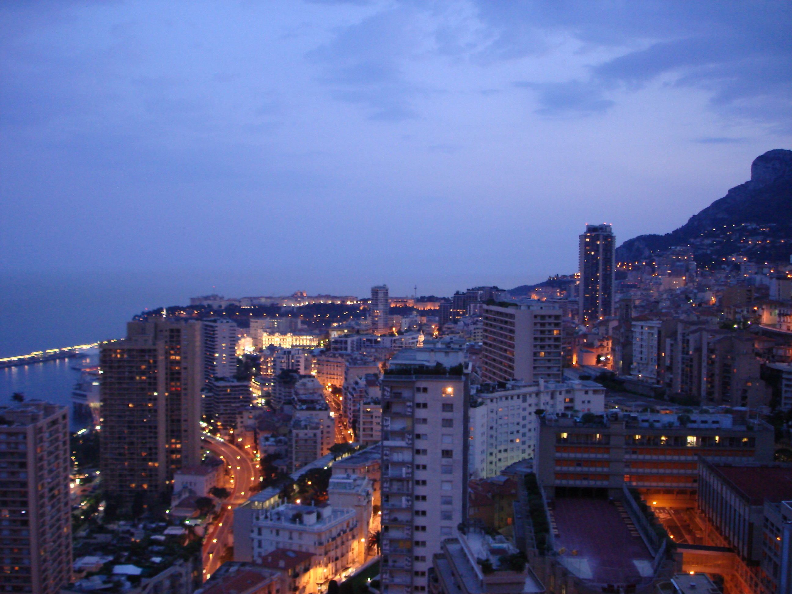 Questa foto rappresenta una vista su Monaco di sera.